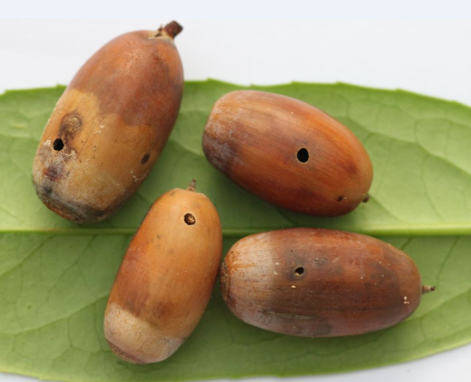 Eicheln mit Bohrlöchern des Eichelbohrers (Curculio glandium)